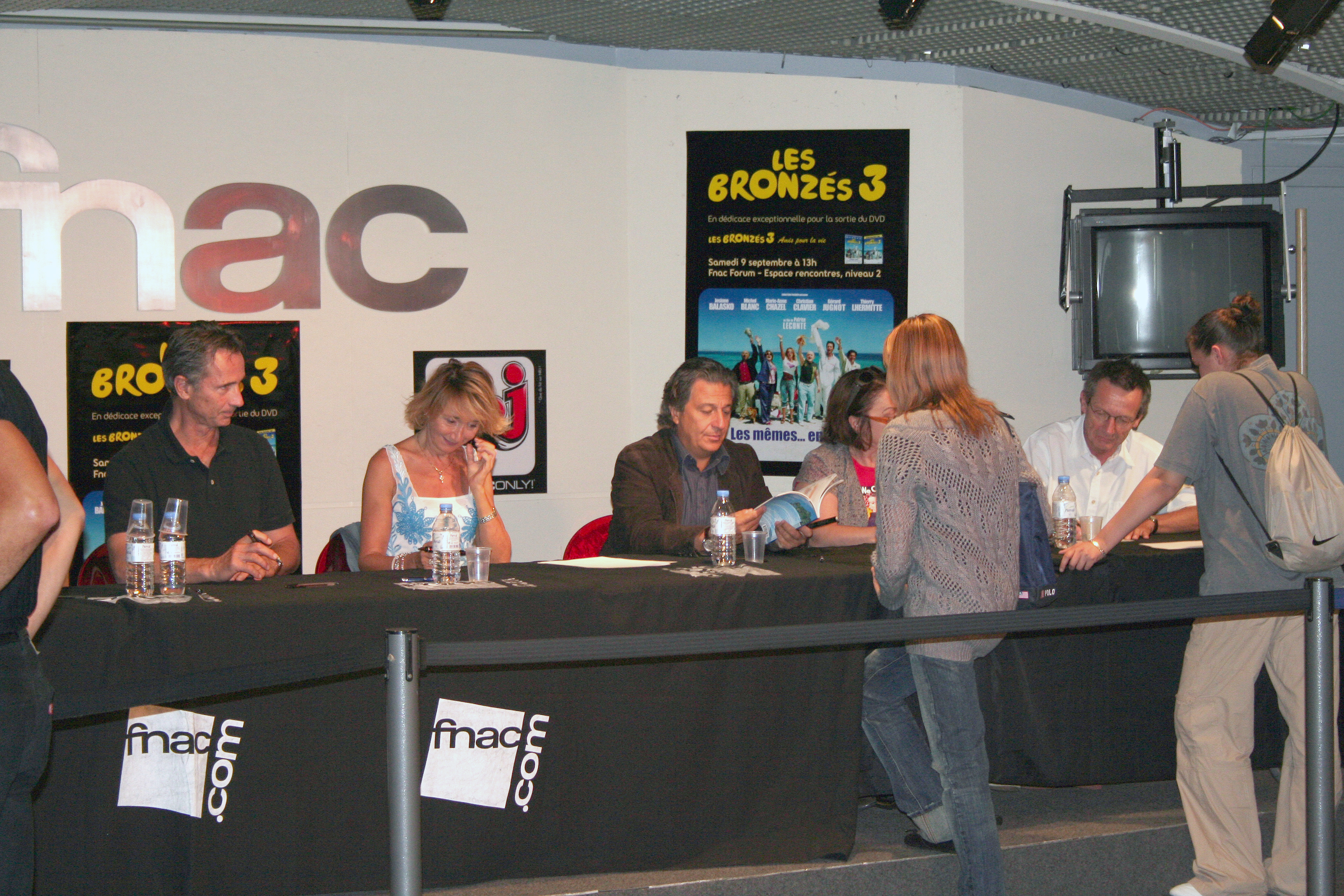 Séance de dédicaces avec l'équipe des Bronzés organisée par la Fnac des Halles (Paris, France).